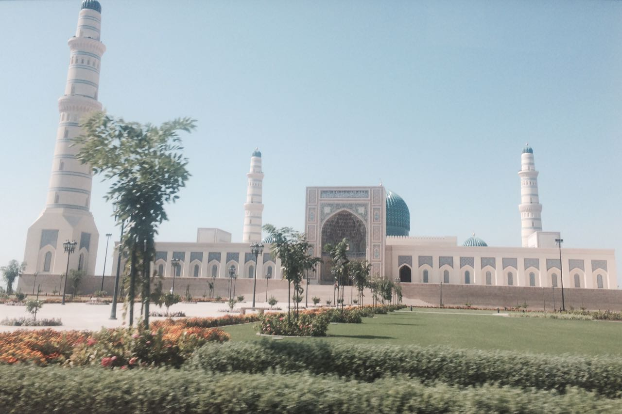 واجهة جامع السلطان بصحار